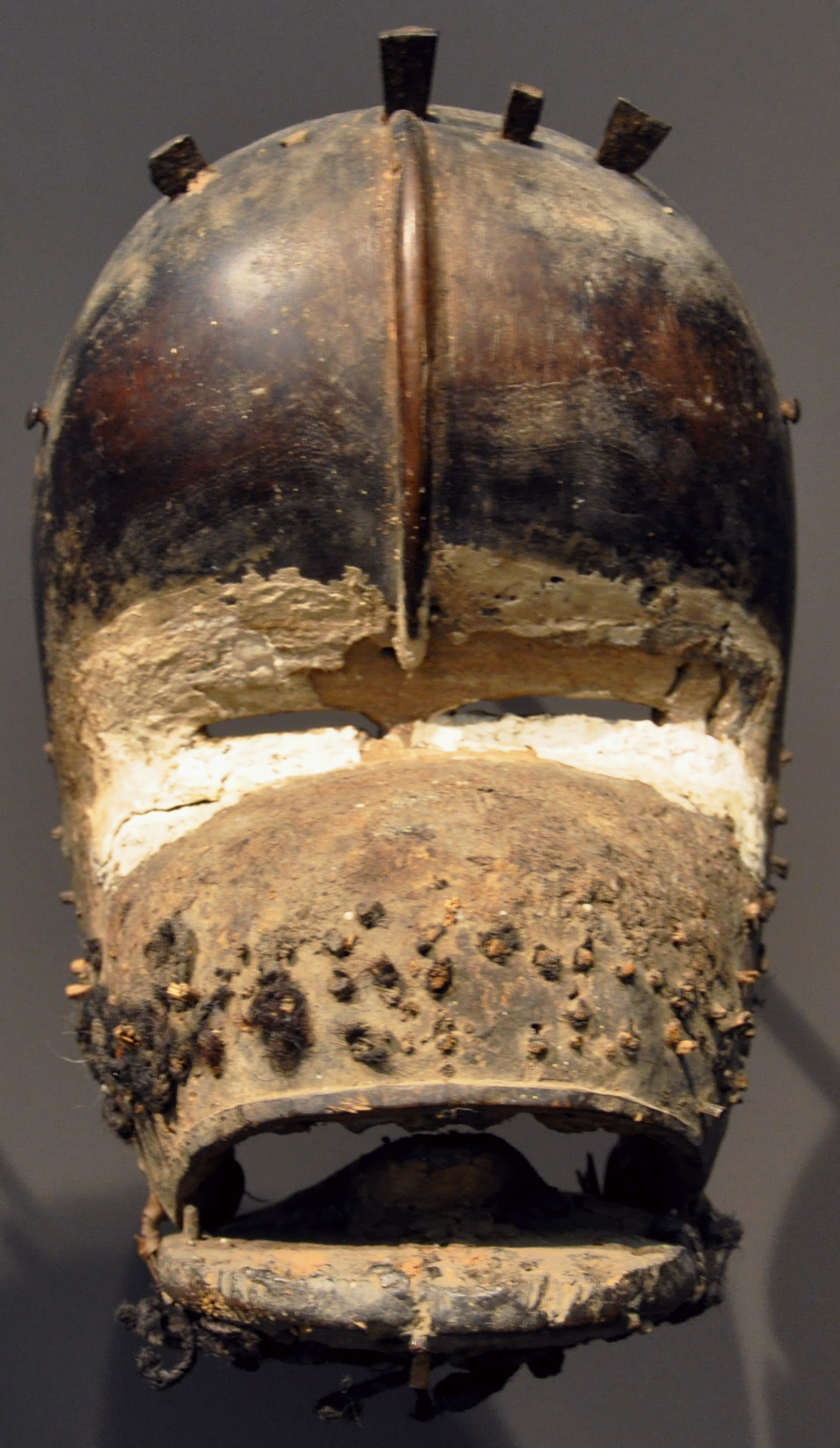 Schimpansen-Maske kaogle, Liberia, Werkstatt der südwestlichen Dan-Region, um 1900; Holz Museum Rietberg, Zürich; Geschenk Peter Blöchlinger, Inv. Nr. RAF 428